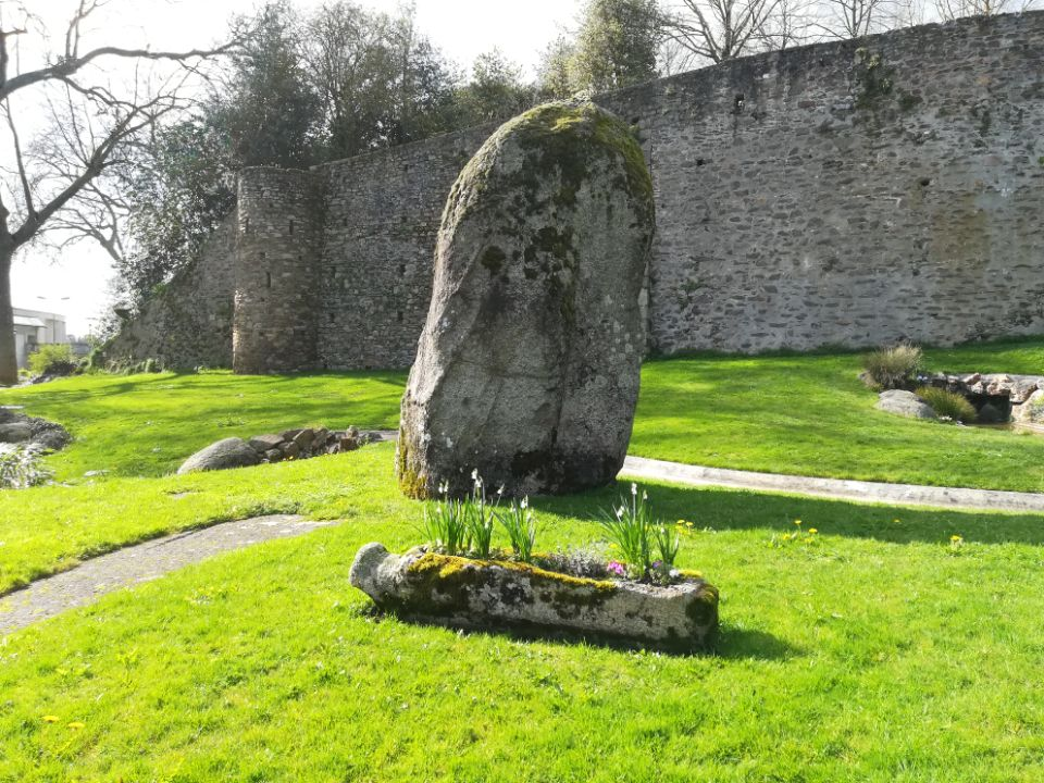 menhir de la garde présent dans le Jardin du Mail à Cholet et les remparts de l'ancien château